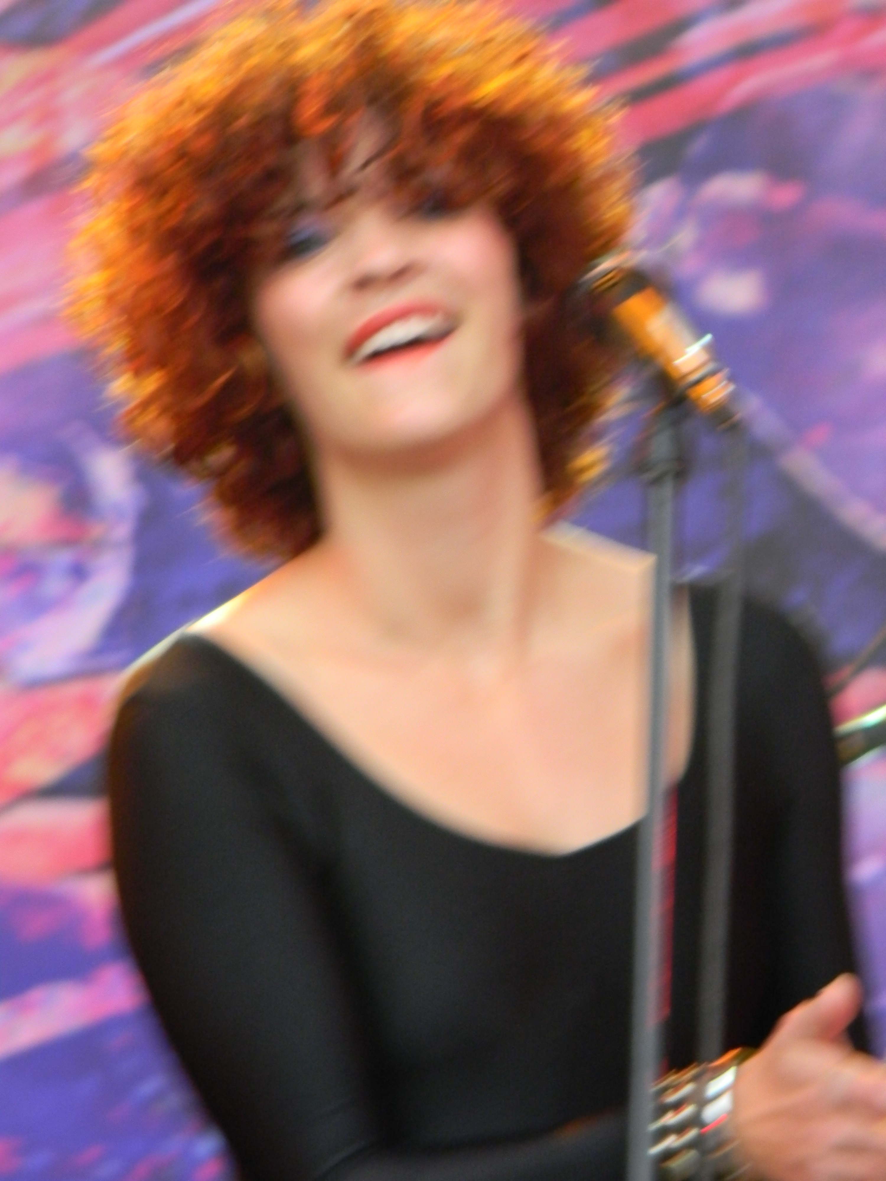 16.06.2011 in Leipzig